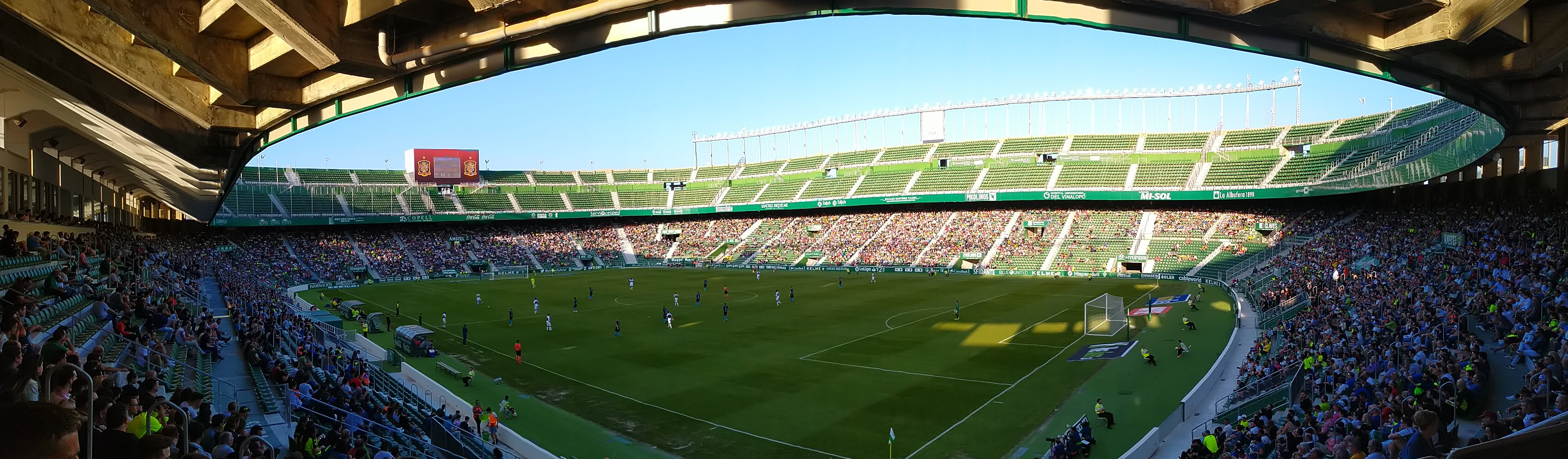 Imagen del partido Elche - Lugo en 2018